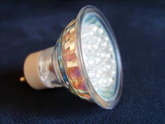 LED spotlight lamp